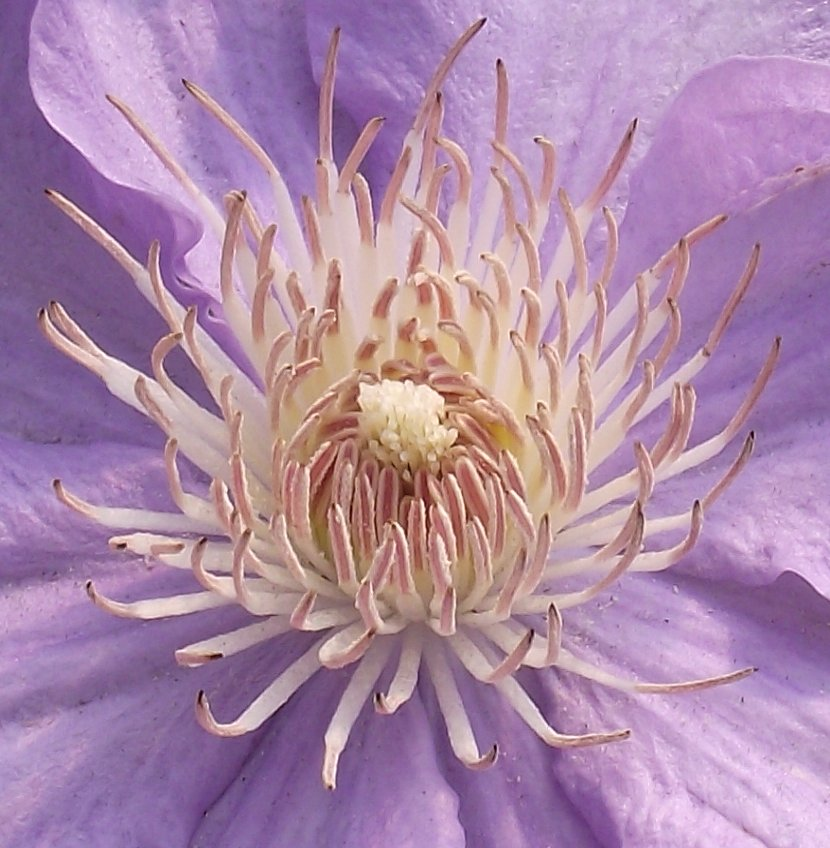 Etamines et stigmates de clematite Angelique 'Evipo017'